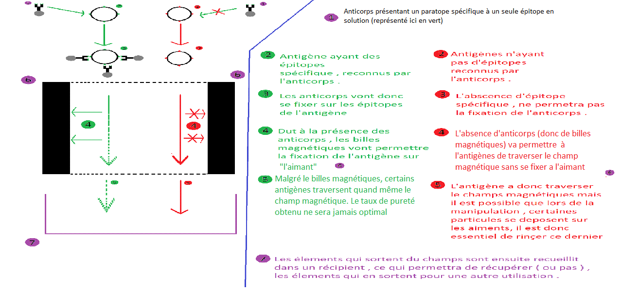 sélection positive ou négative lors du tri cellulaire magnétique